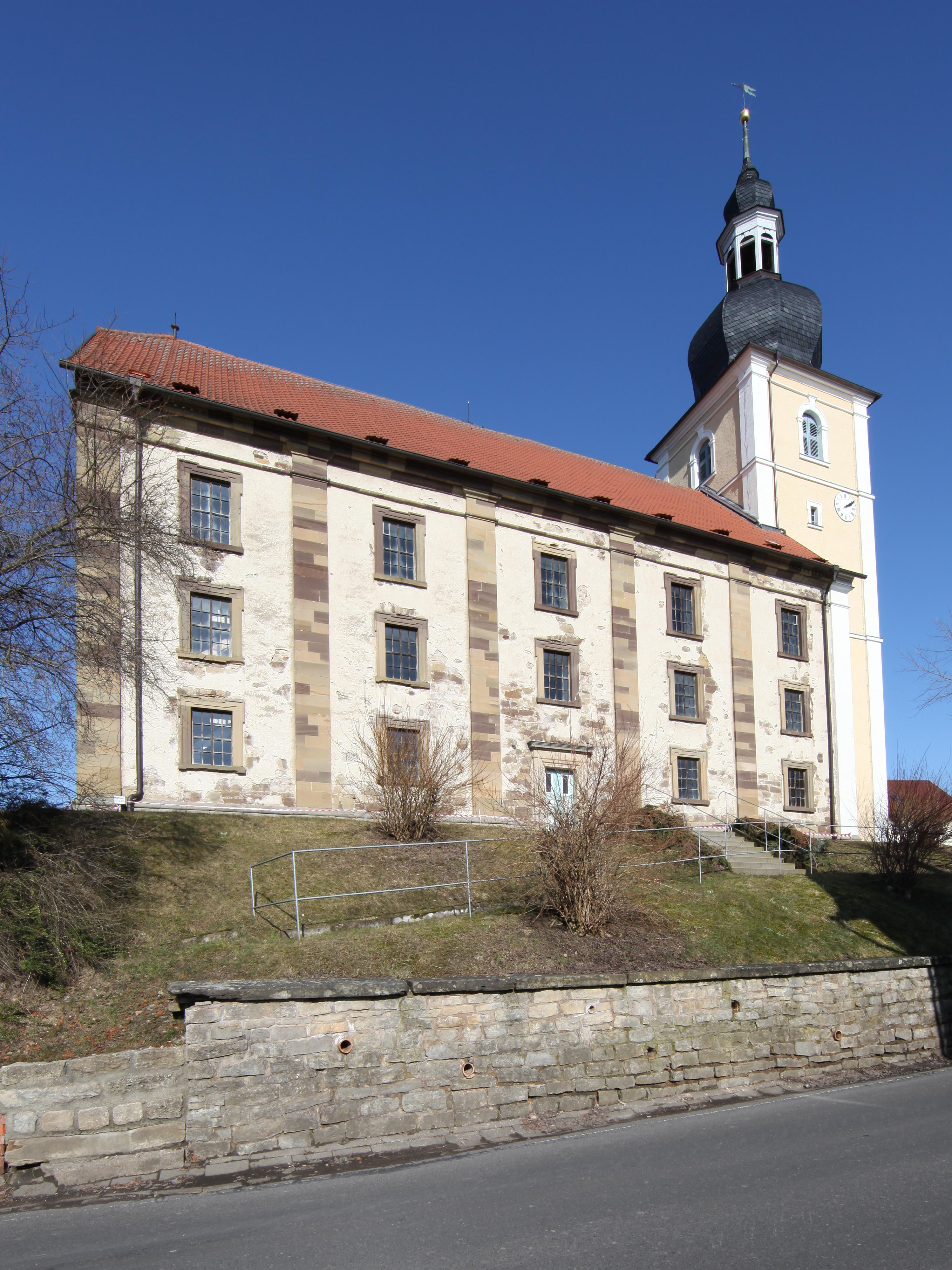 Ev. Marienkirche 1749 in Eishausen, OT von Straufhain, Landkreis Hildburghausen